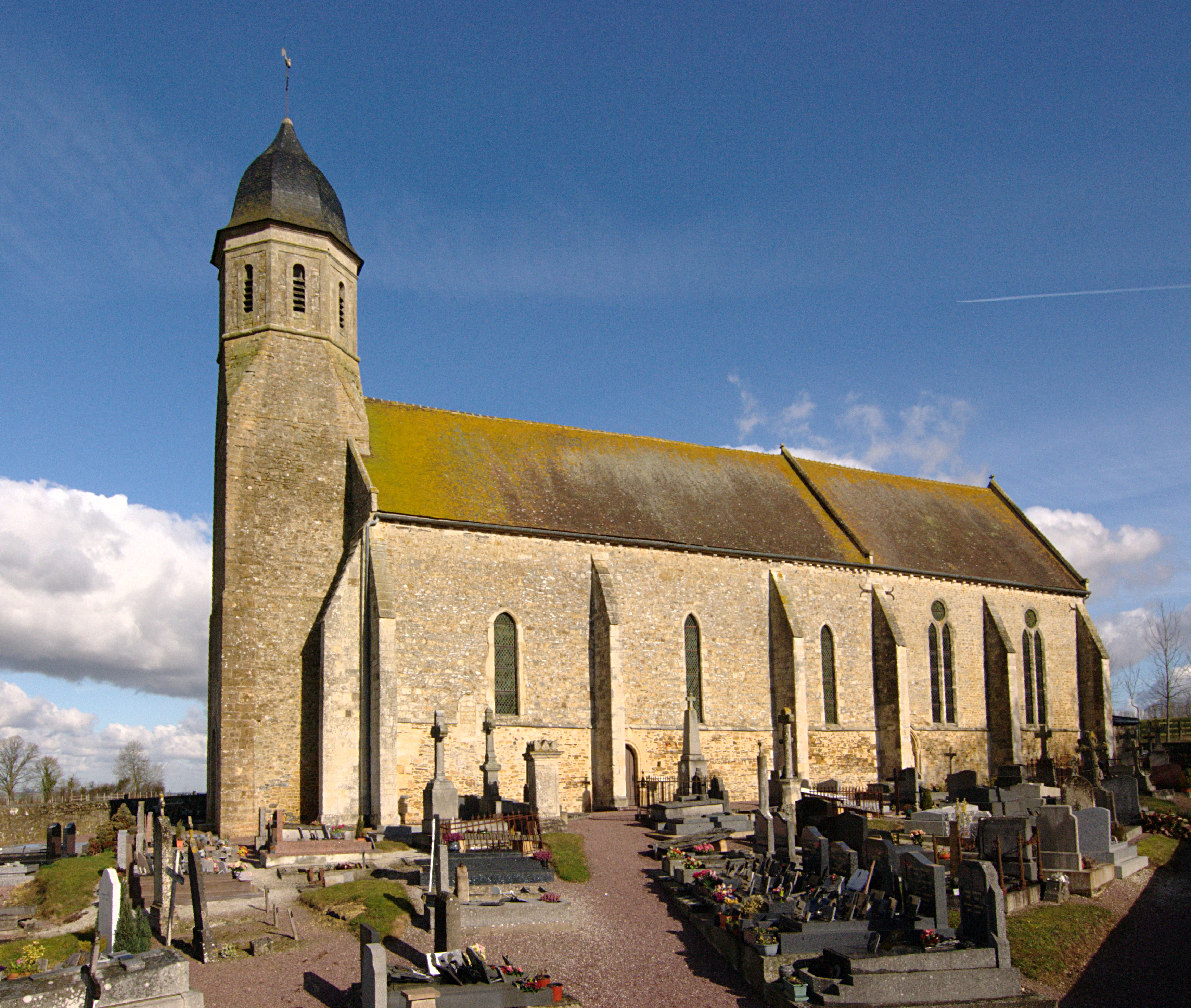 Église Saint-Martin de Croisilles (Calvados, France), inscrite à l'inventaire supplémentaire des monuments historiques (ISMH, 13/04/1933).